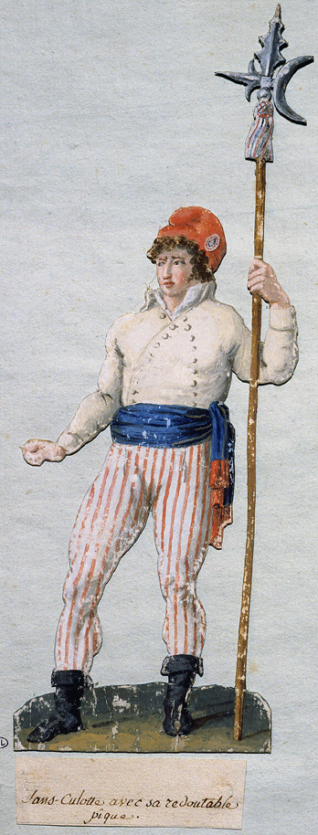 Un sans-culotte avec sa pique, gouache des frères Lesueur, 1793-1794, Musée Carnavalet, Paris.